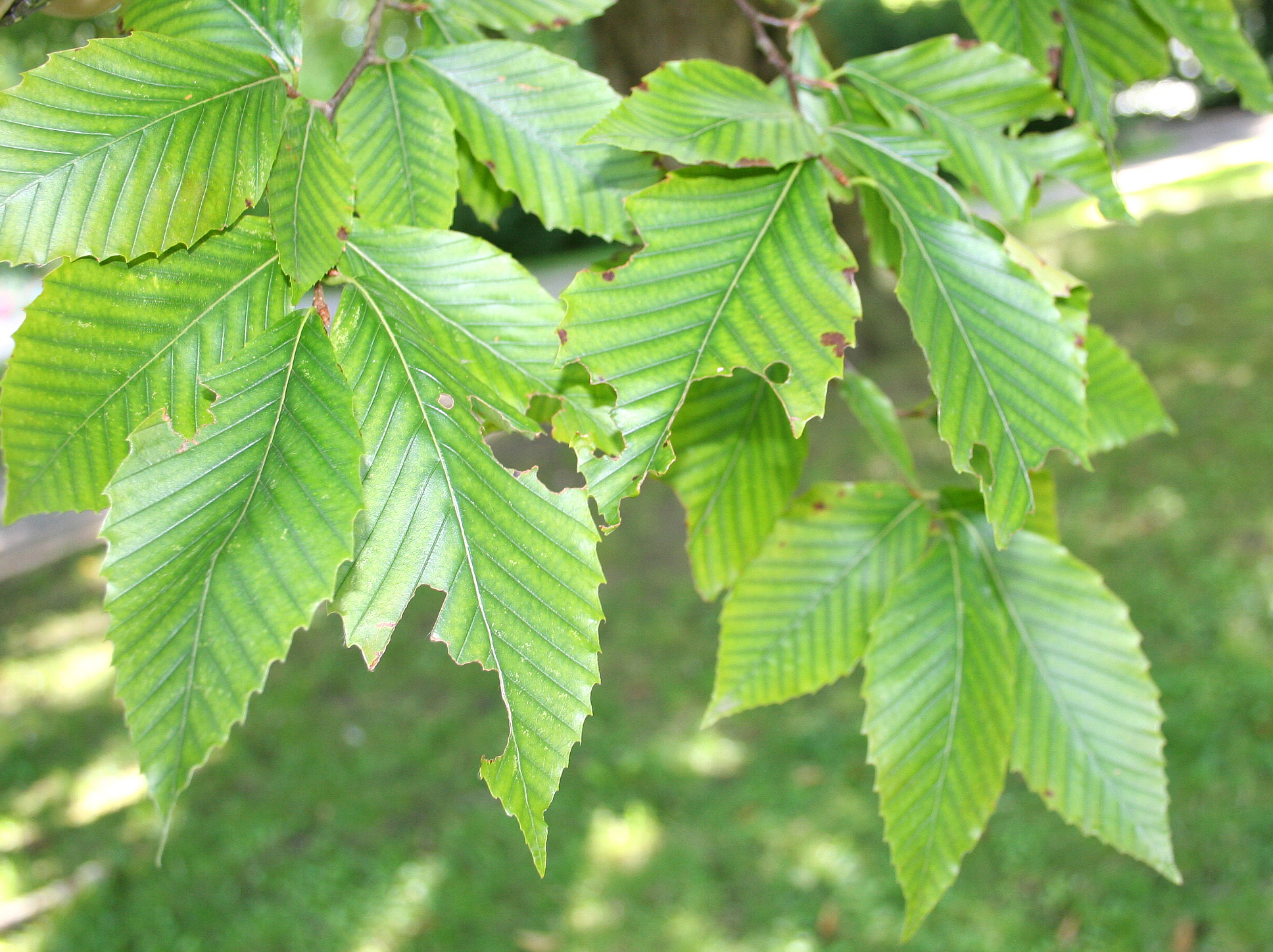 Feuilles du hêtre d'Amérique (Fagus grandifolia)